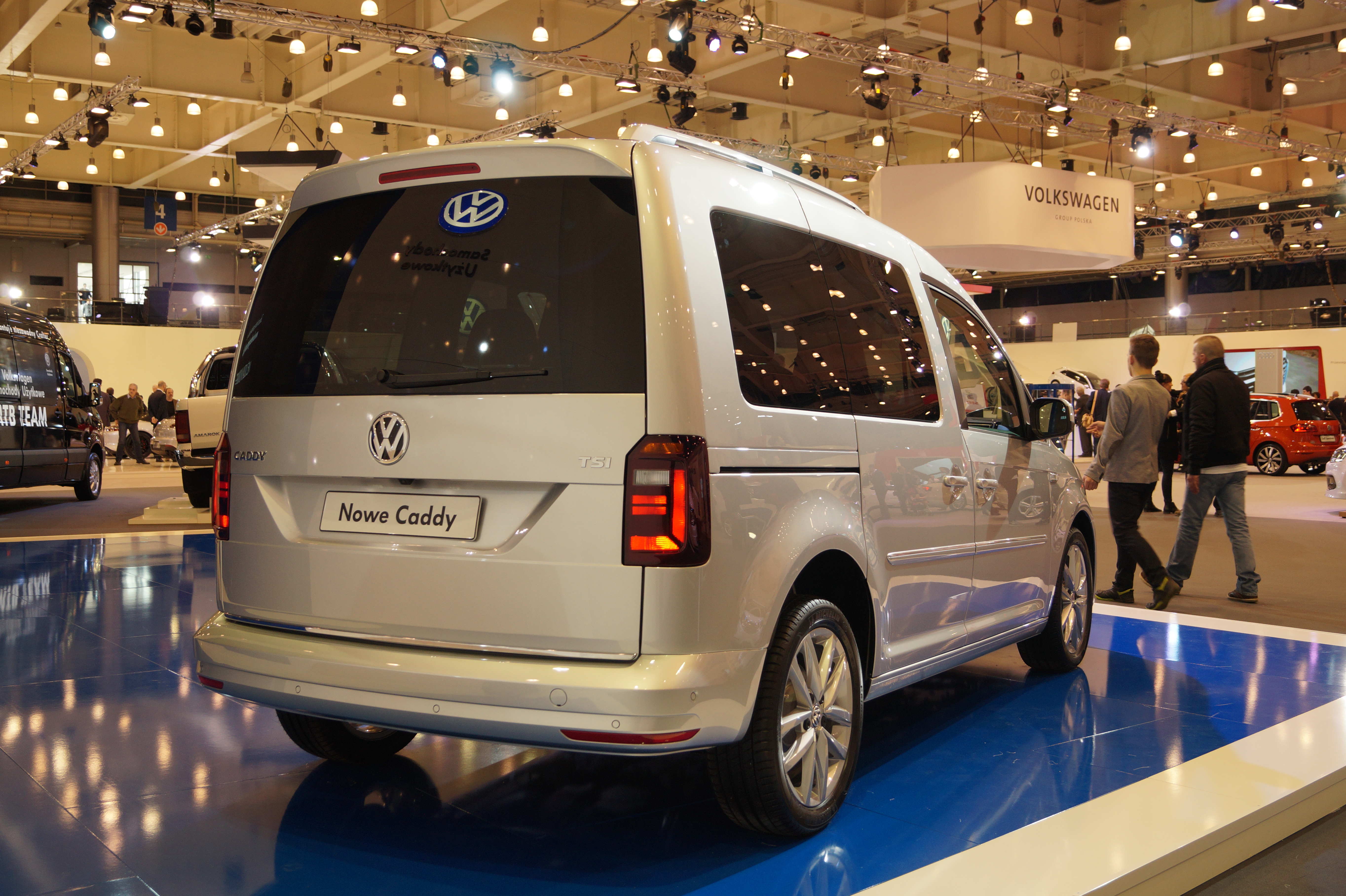 The making of this document was supported by Wikimedia Polska Association, within Wikigrant no. WG 2015-19. English | polski | +/− Tył Nowego Volkswagena Caddy na Motor Show Poznań 2015